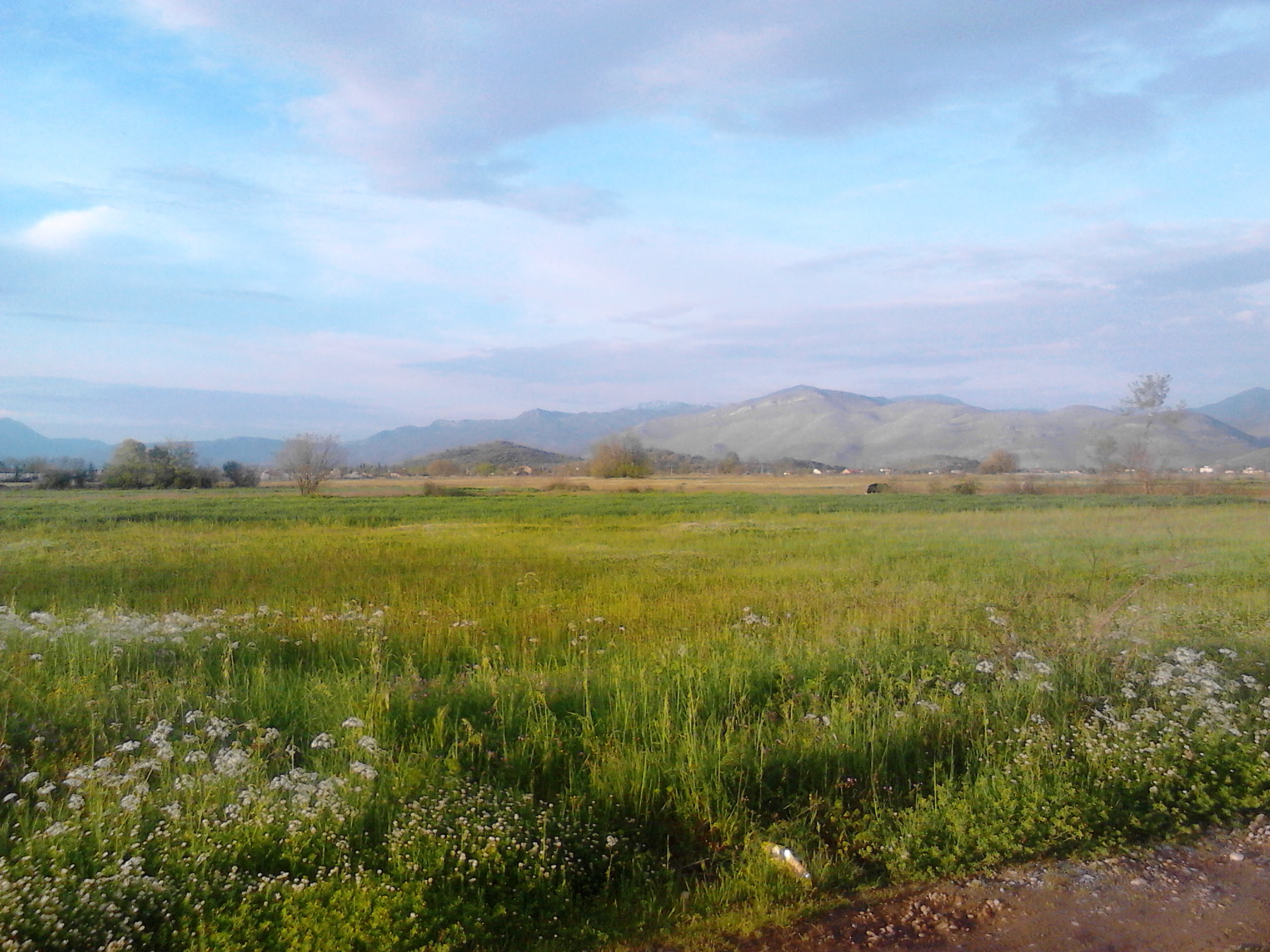 Srpski (latinica): selo Mataguži,kod Podgorice,Crna Gora